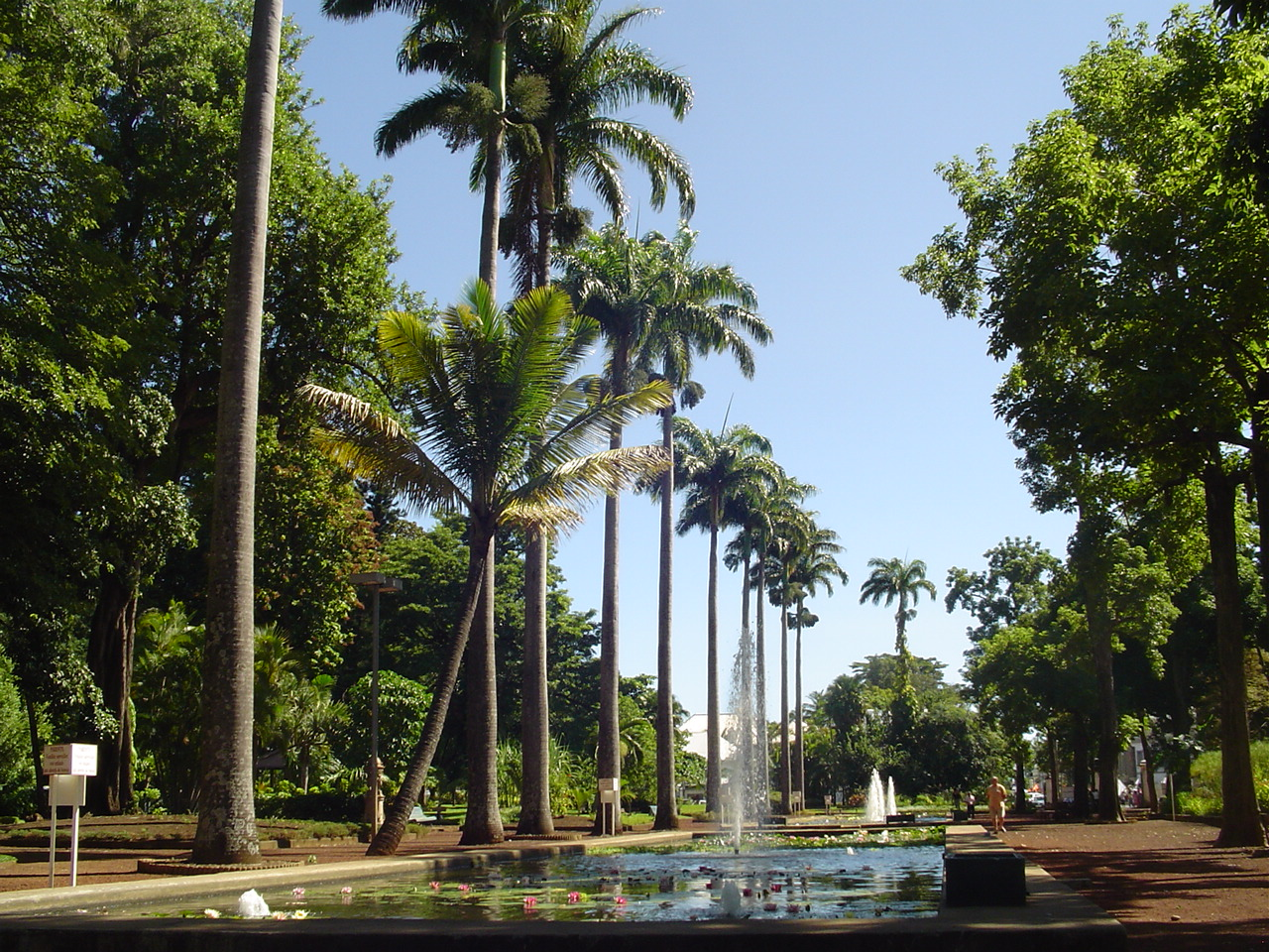 Jardin de l'Etat, Saint-Denis